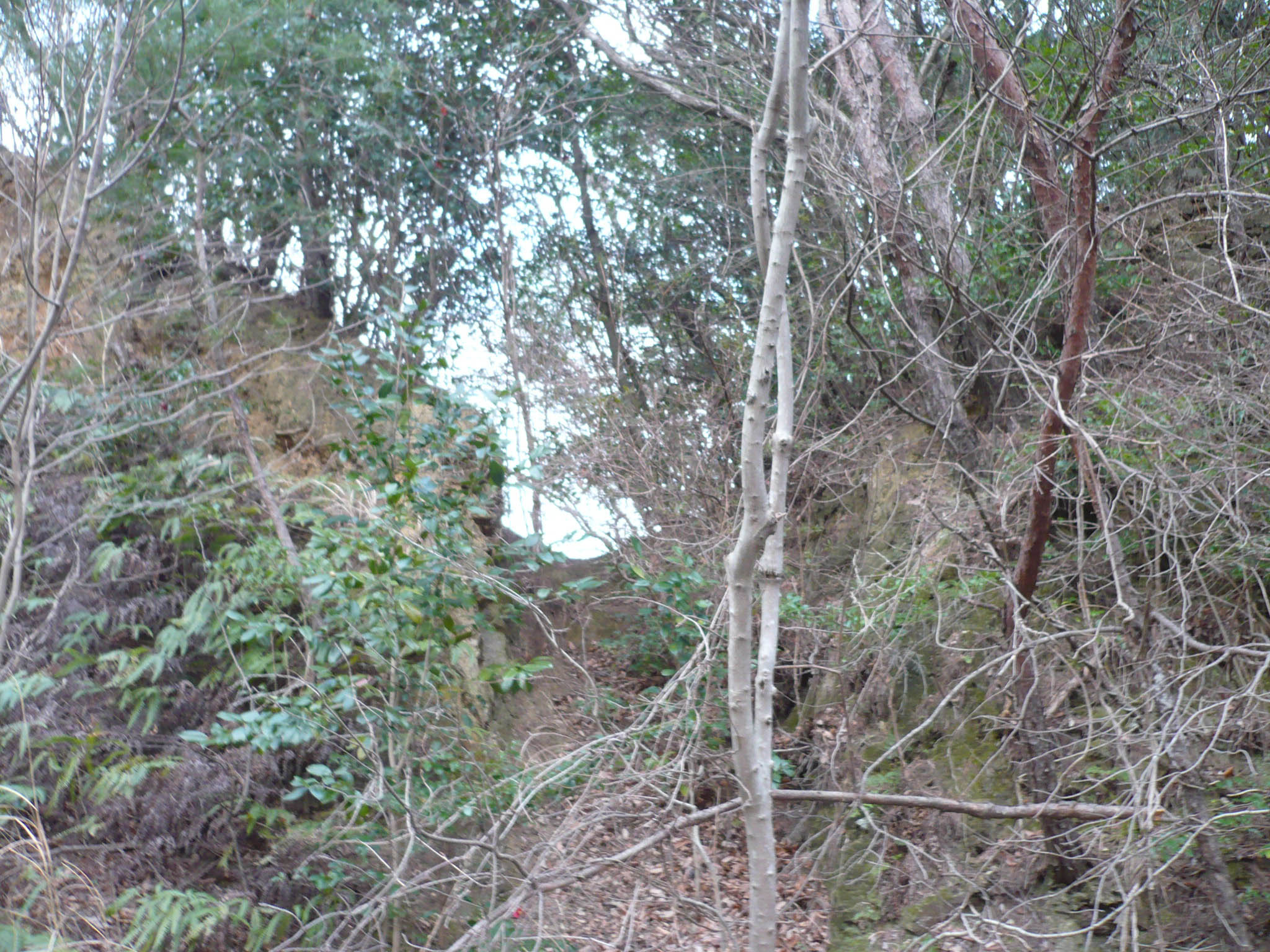 上桜城